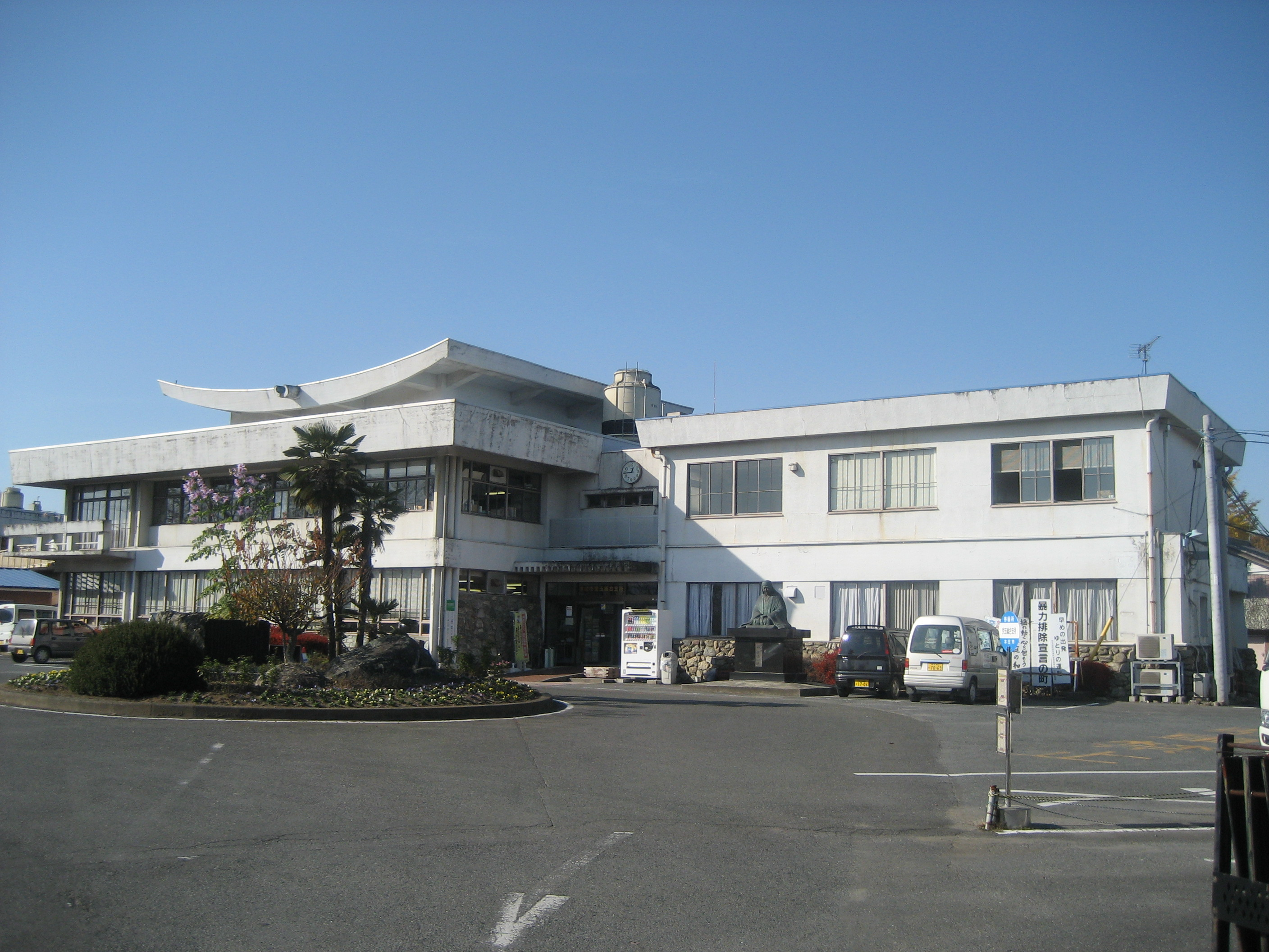 埼玉県本庄市役所児玉総合支所庁舎（旧児玉町役場）